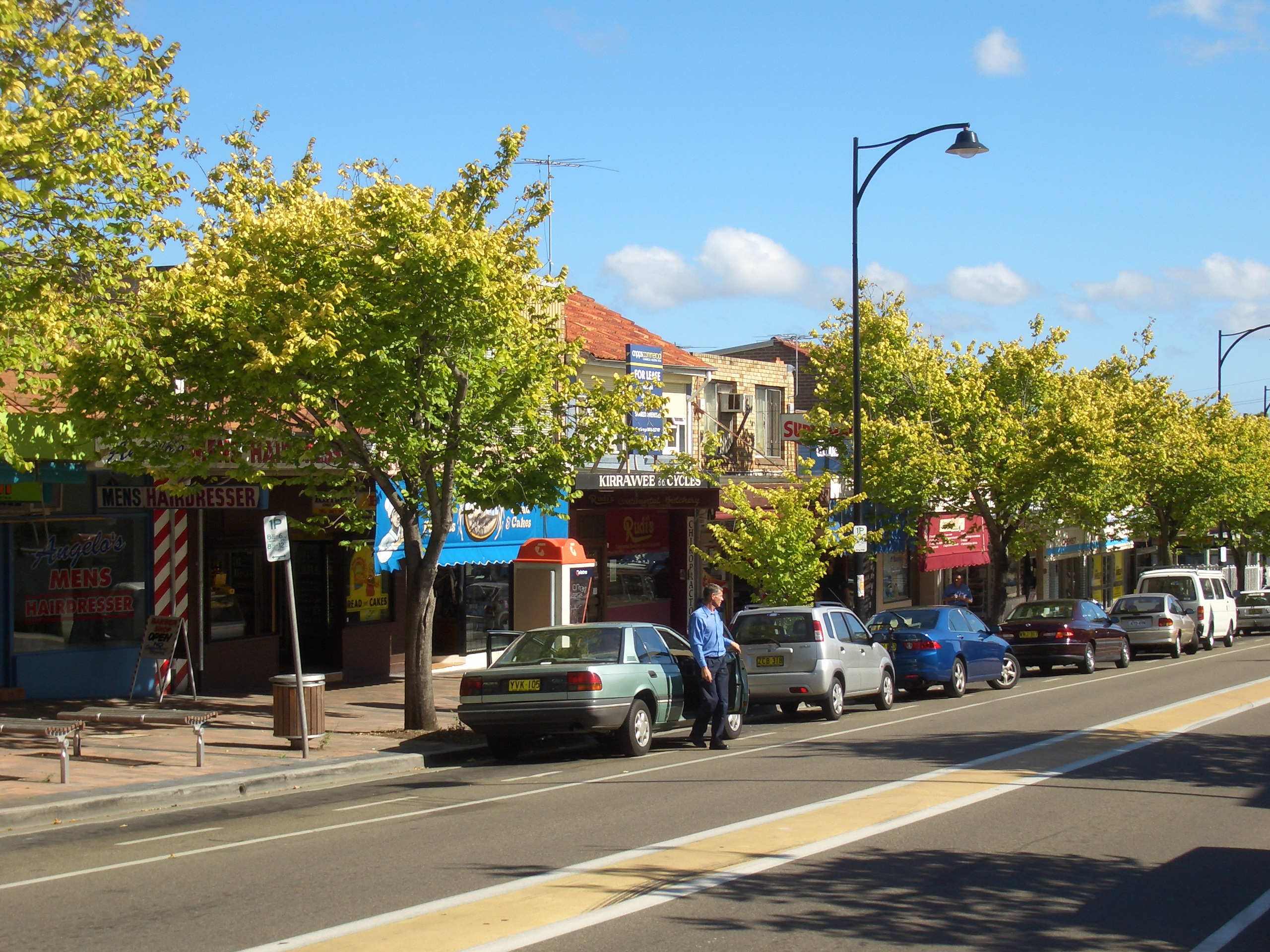 Kirrawee